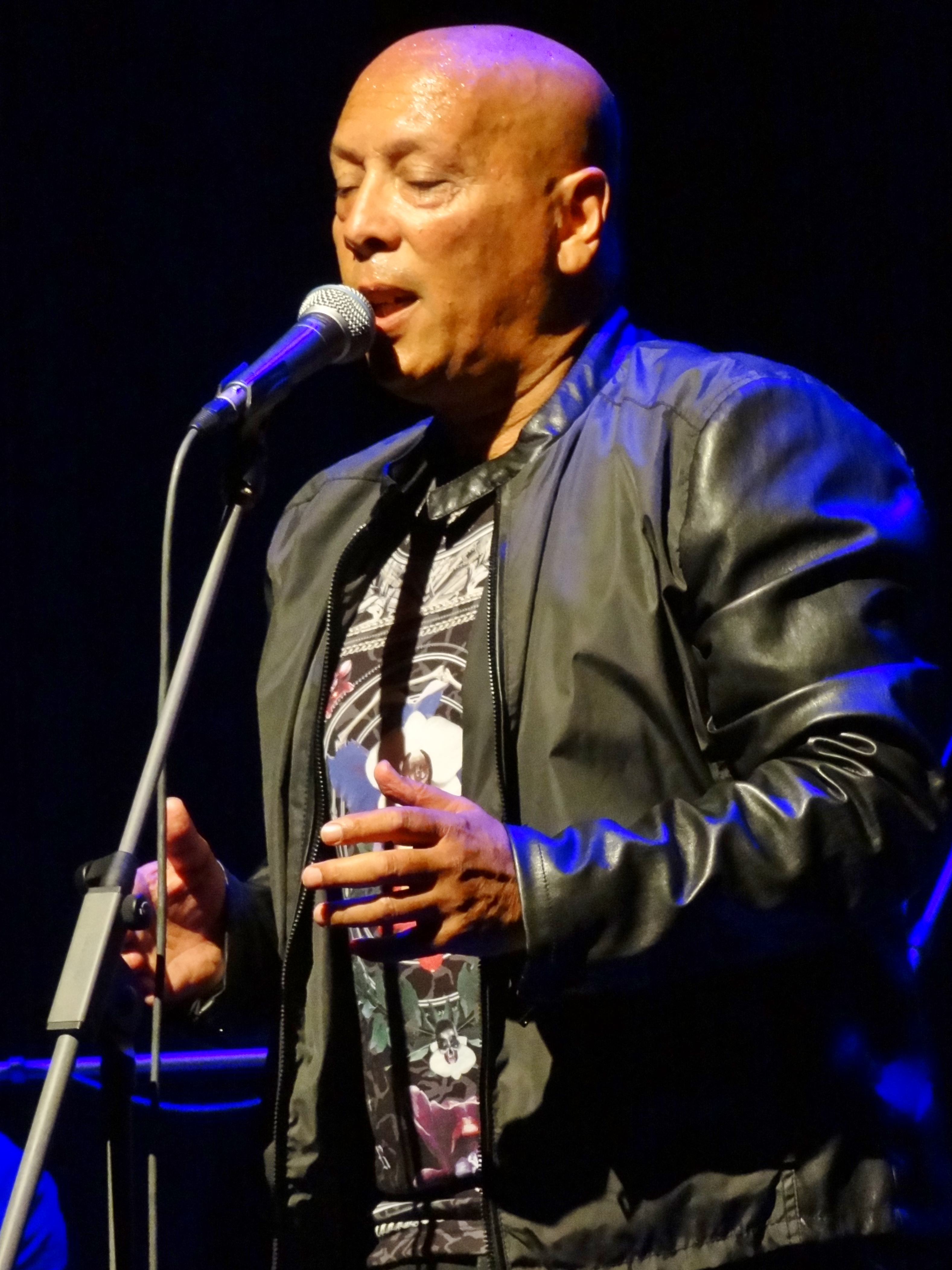 Lenny Zakatek in Artà, Mallorca, Spanien